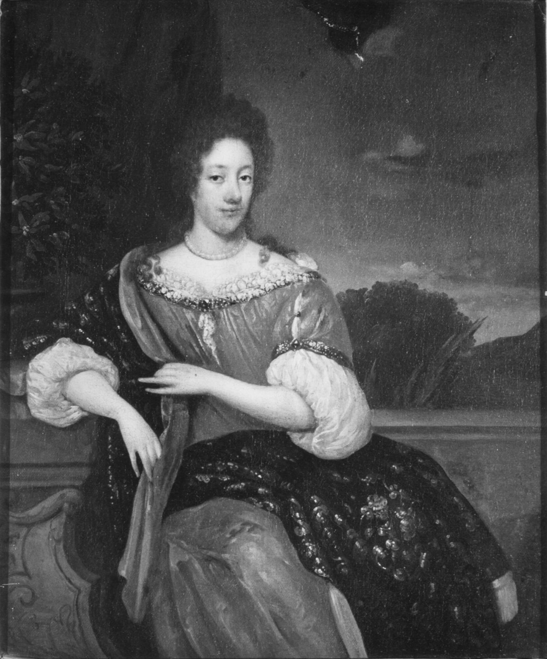 probably Walburg van Heeckeren (1656-1731)